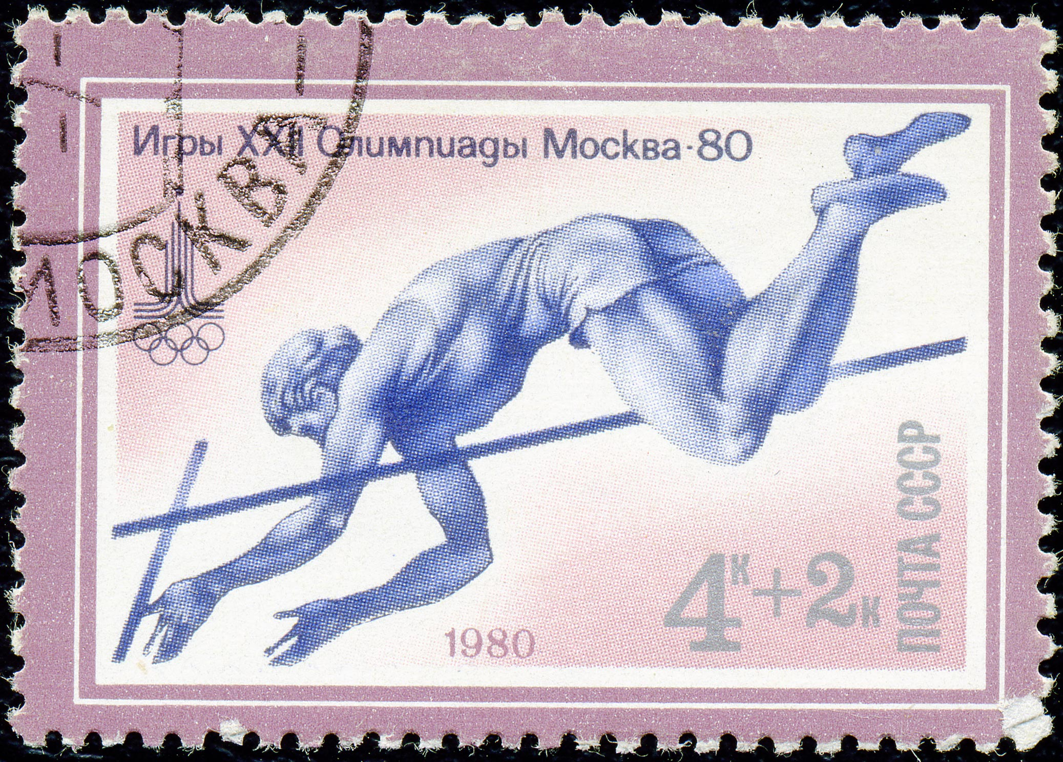 Почтовая марка СССР. 1980. XXII Летние Олимпийские игры. Прыжки с шестом